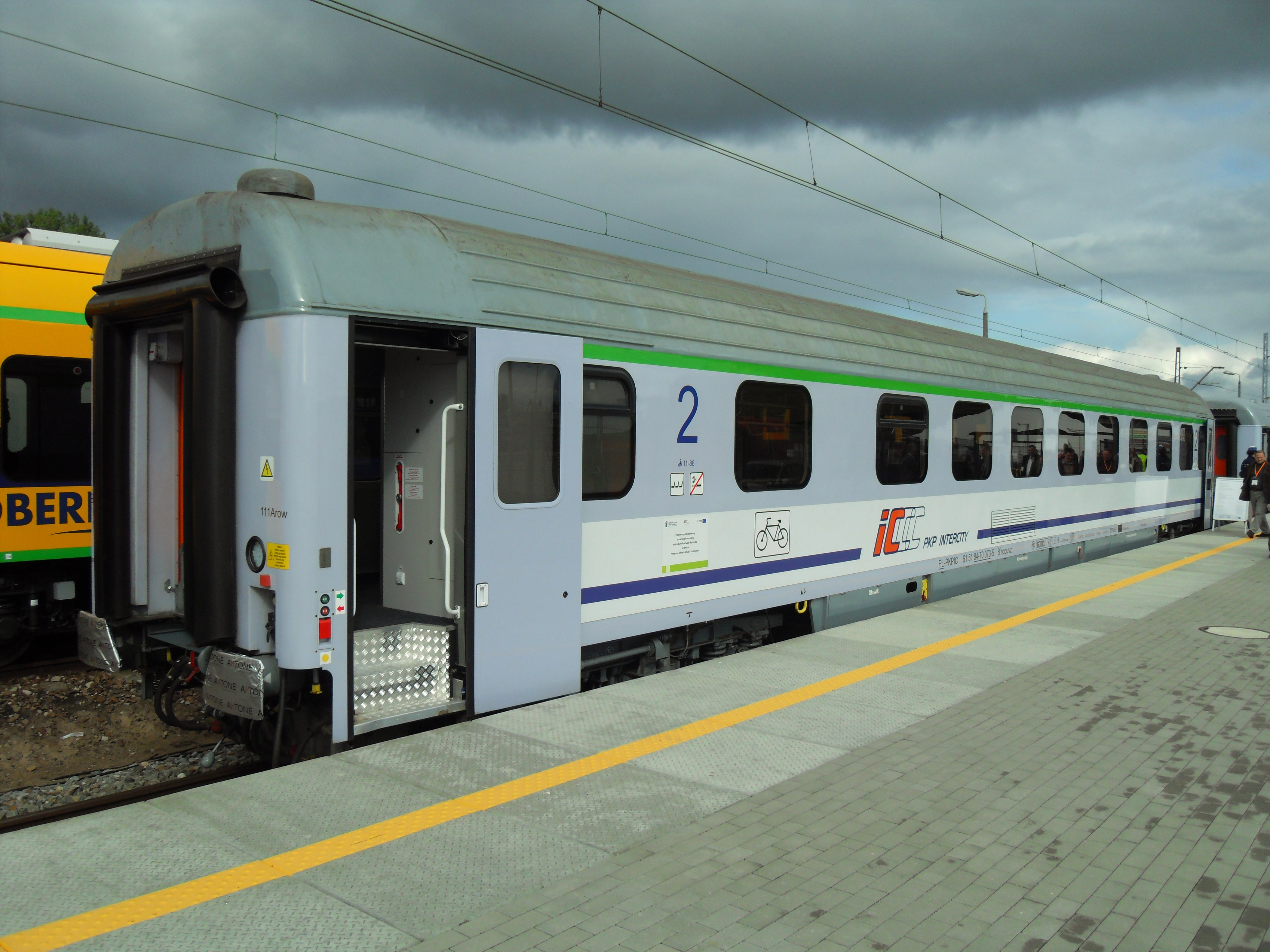 Gdańsk Letnica. TRAKO 2013, wagon 111Arow (modernizacja Pesa).